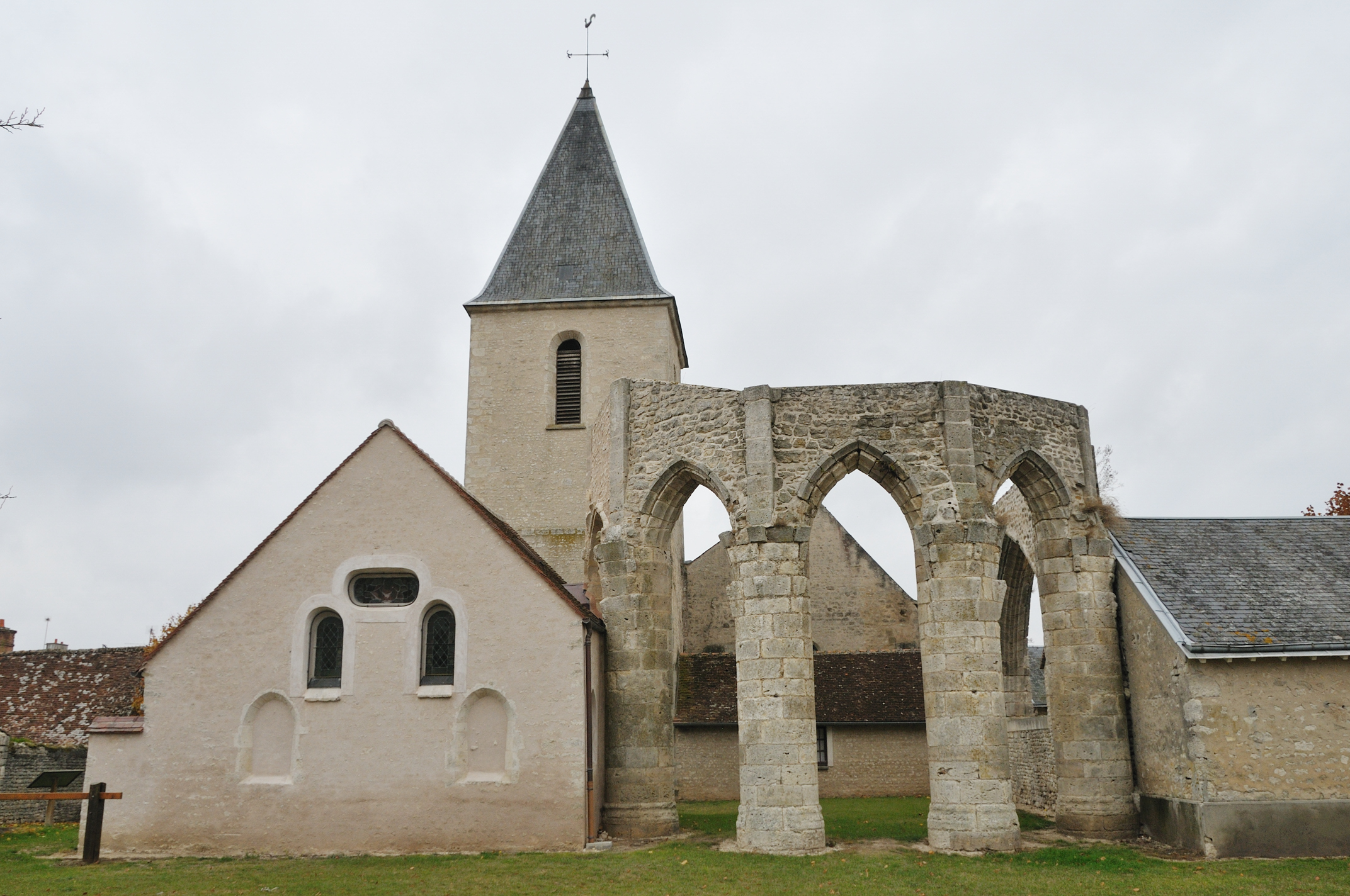 Chœur inachevé et chapelle Saint-Hubert, église Saint-Jacques-le-Majeur, Courcelles, Loiret, France